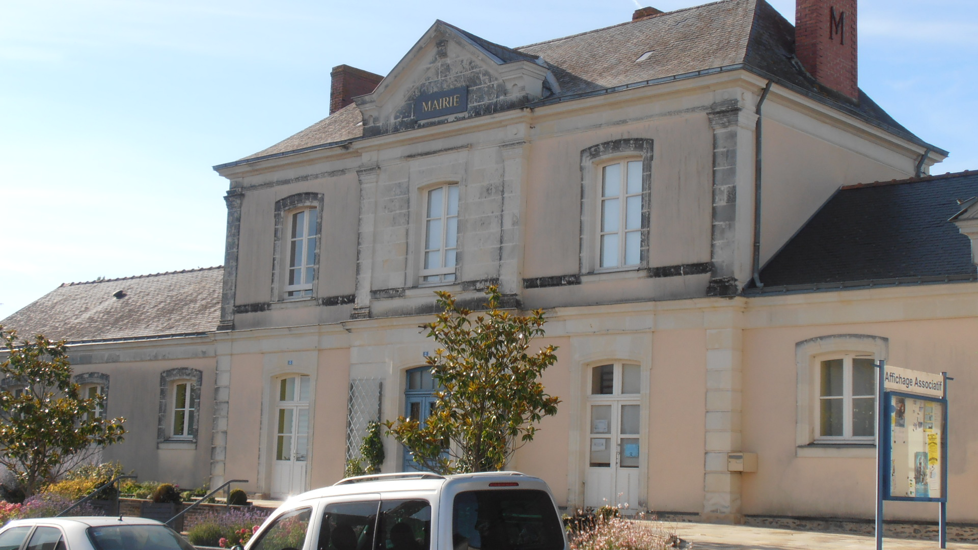 La mairie de la commune de Villemoisan (Maine-et-Loire, France).